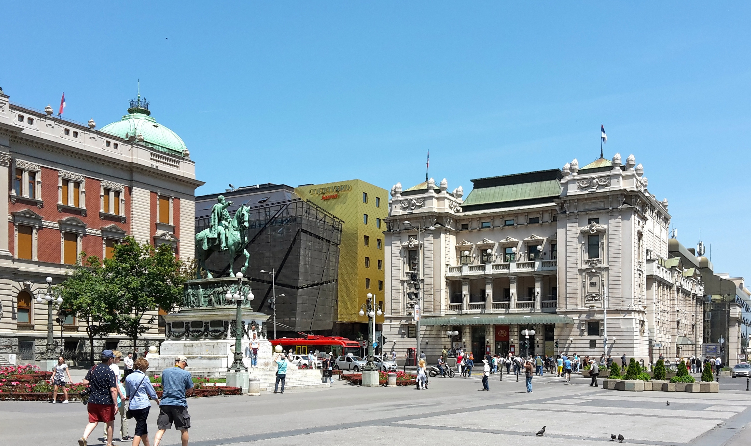 Republic Square